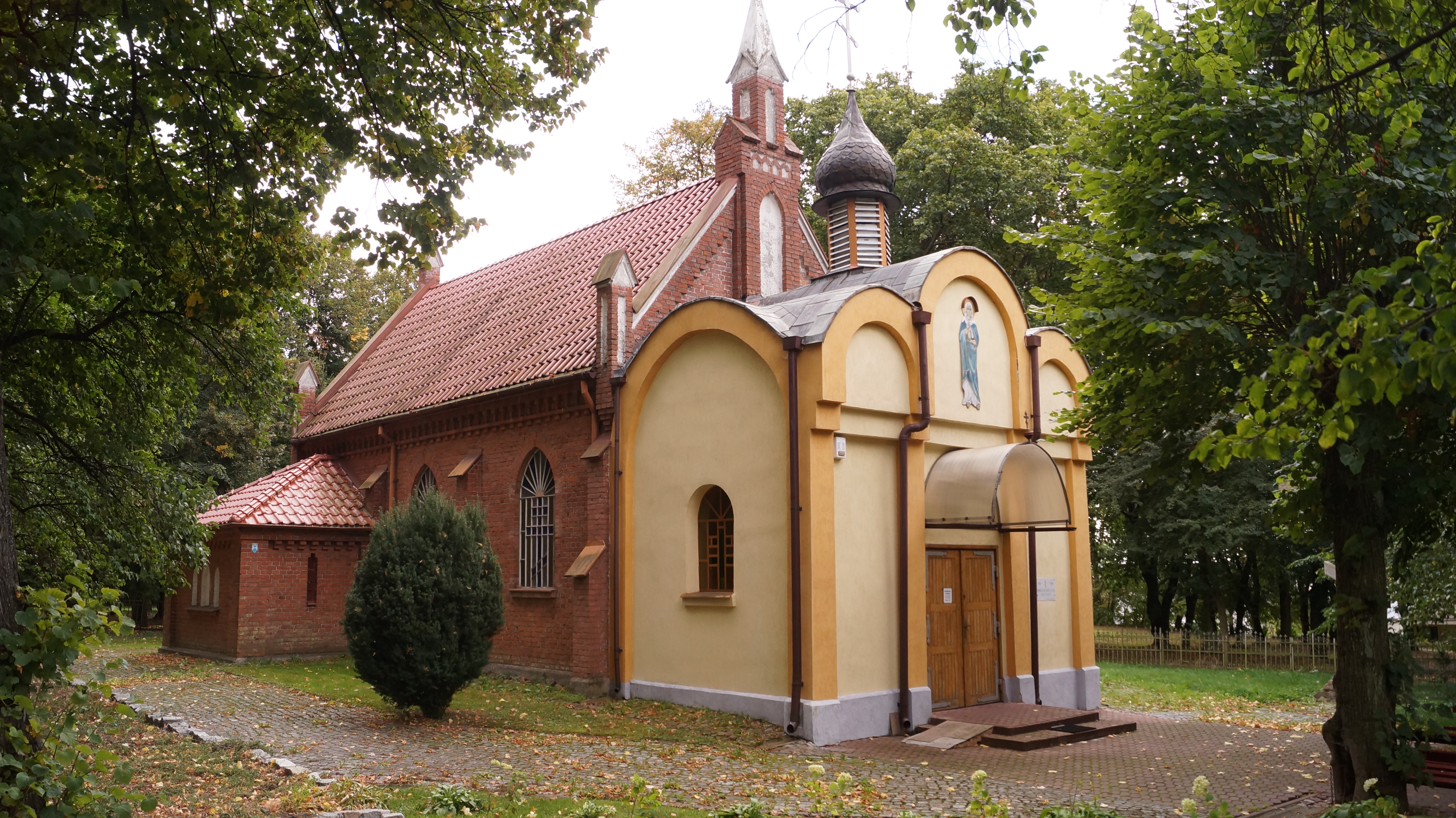 Elbląg, kaplica, ob. cerkiew prawosławna p.w. św. Marii Magdaleny, 1910, 1925, po 1987